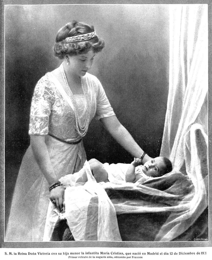 Retrato de la reina Victoria Eugenia de Battenberg y la infanta María Cristina de Borbón y Battenberg, obra del fotógrafo Christian Franzen, recogido en la revista española Mundo gráfico.